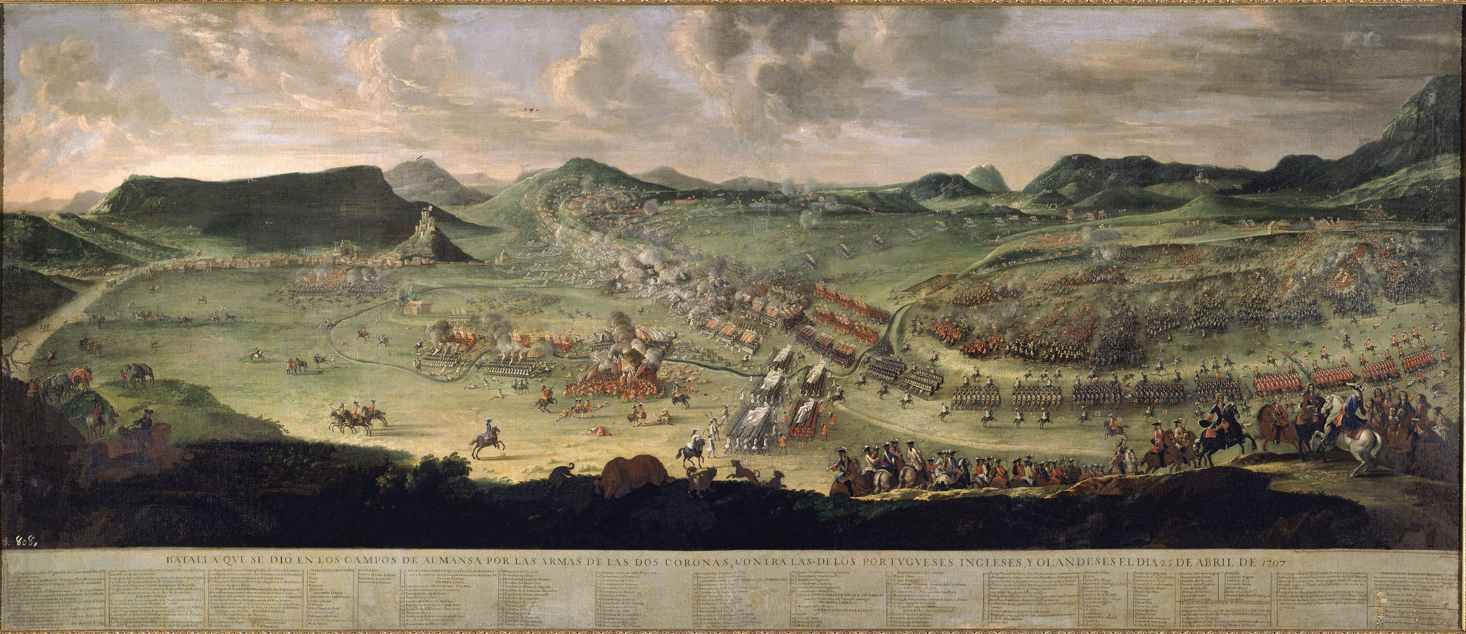 La Batalla d'Almansa, oli sobre tela, 161 x 360 cm, Madrid, Museu del Prado, núm. inv. PO2942.